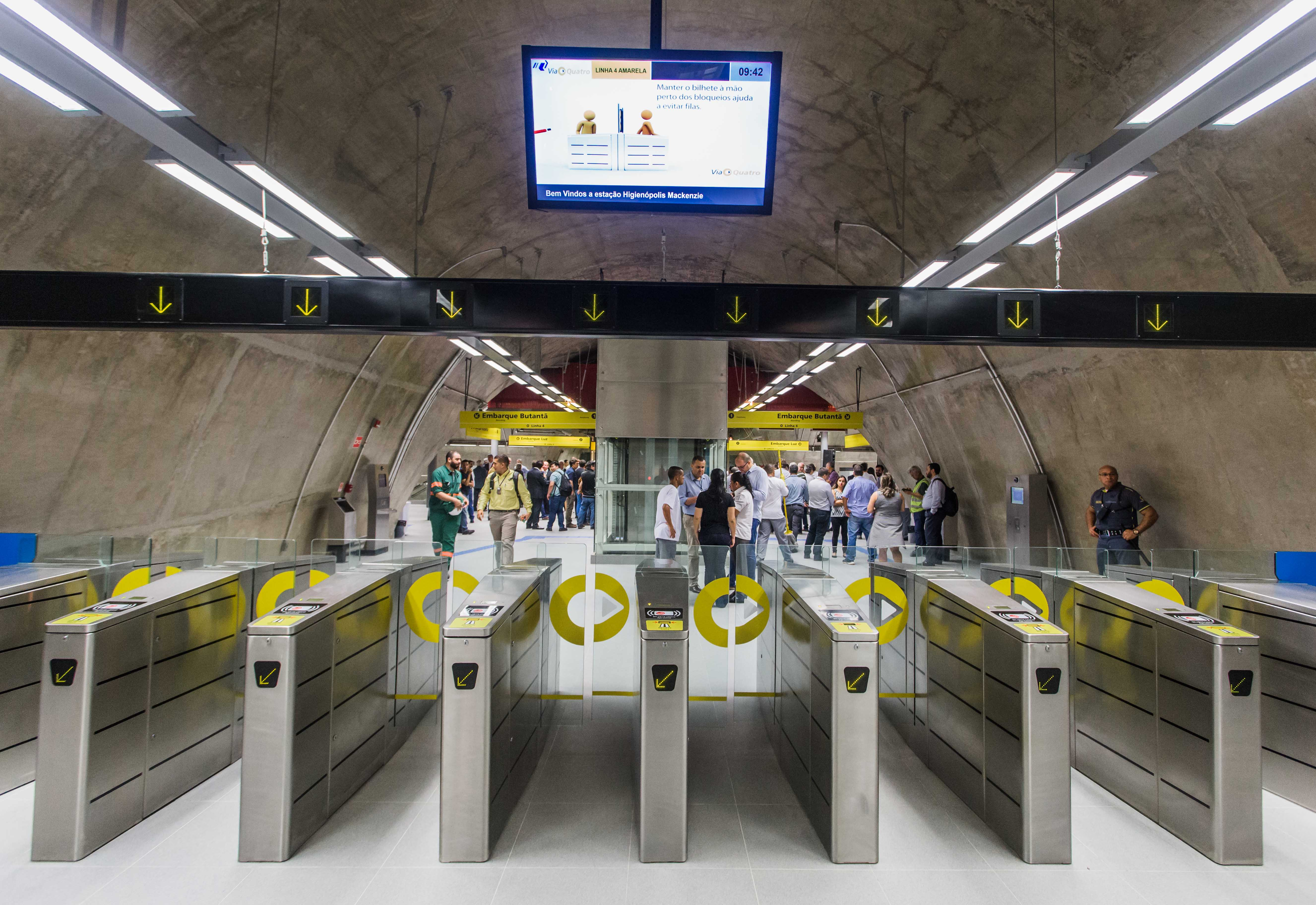 O governador Geraldo Alckmin participou da Entrega da nova estação Higienópolis-Mackenzie, da linha 4 (Amarela) do Metrô. Local: São Paulo/SP. Data: 23/01/2018. Foto: Alexandre Carvalho/A2img